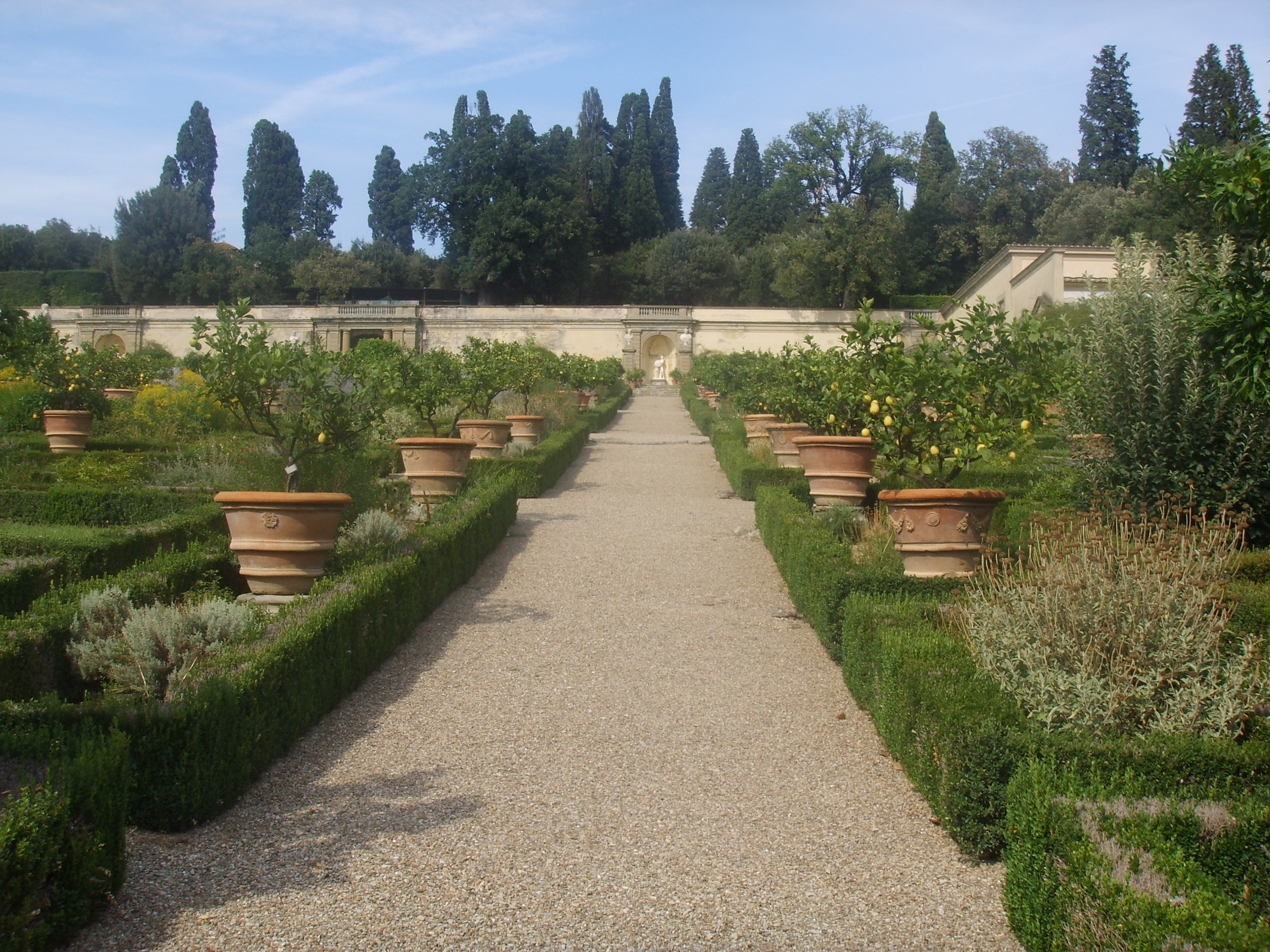 Parco di Villa Reale di Castello (Villa di Castello) in Florence Italy